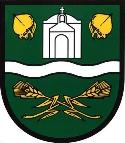 Krchleby, okres Nymburk, znak